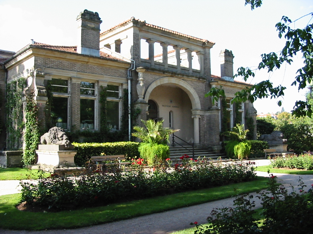 Épinal (département des Vosges, France), Maison Romaine (XIXe siècle) : Bibliothèque (1902-2008).